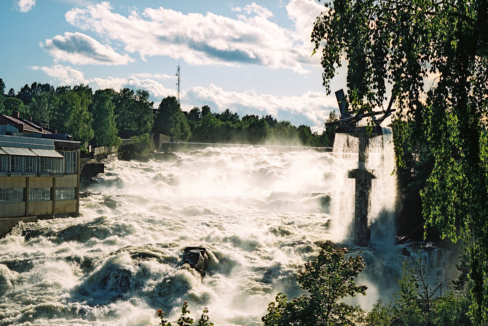 Hønefossen, Ringerike, i flom, juli 2007.